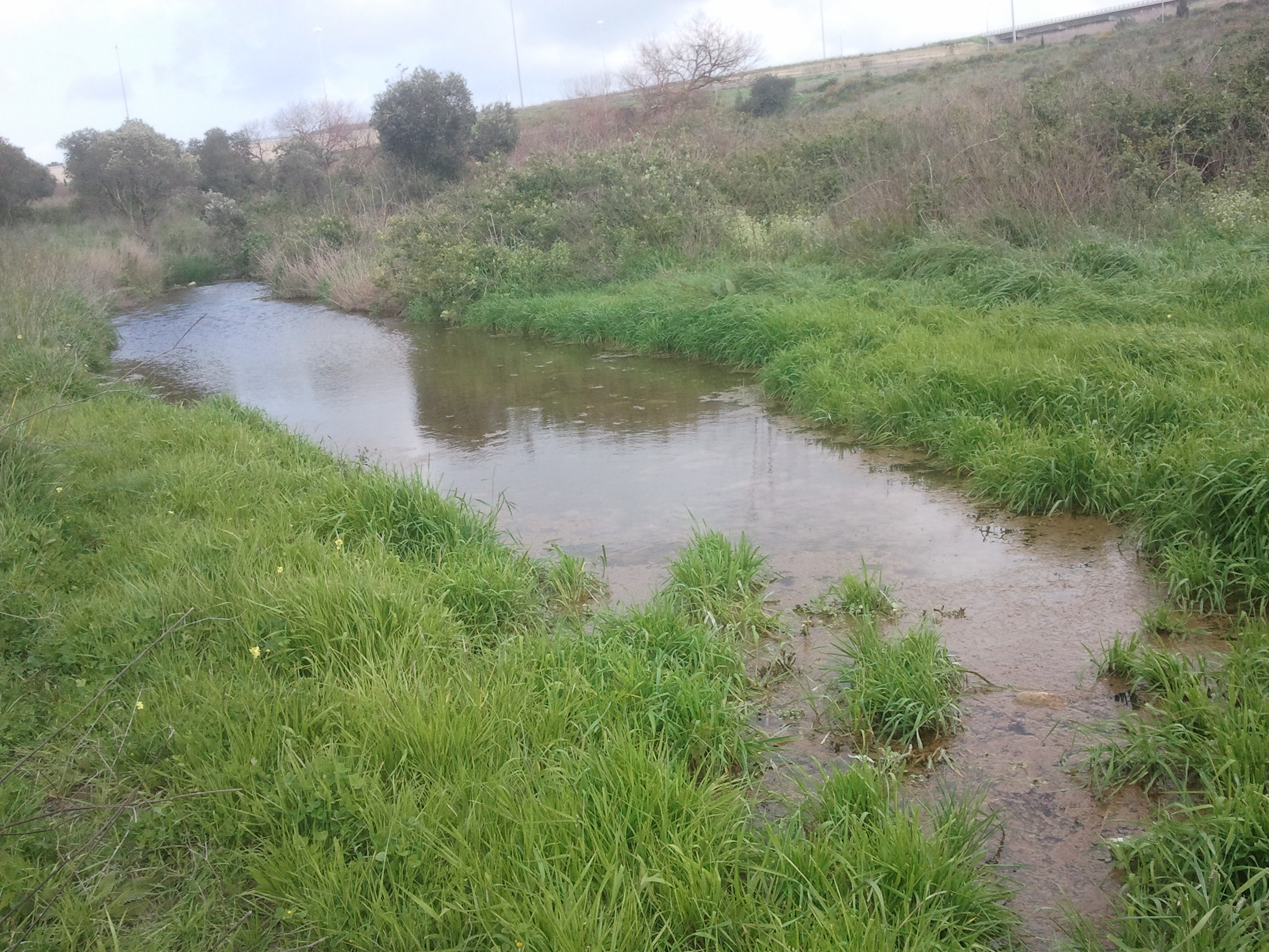 נחל תות מהווה גבול בין הר הכרמל ורמות מנשה. תחילתו ליד מחלף אליקים והוא נשפך לנחל דליה ליד בת שלמה נביעה ליד מטע הזיתים